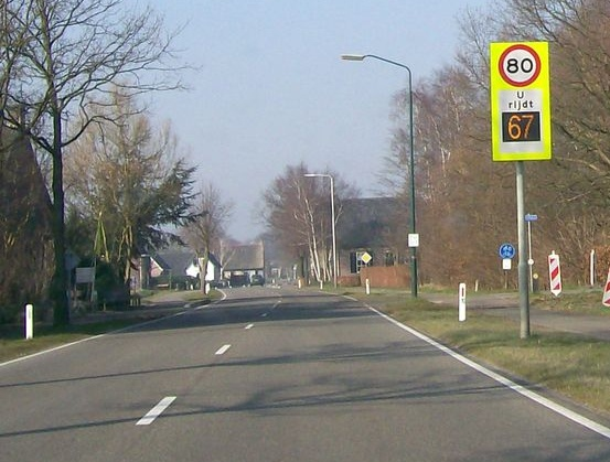 Speed limit sign + driven speed (km/h), Etten-Leur